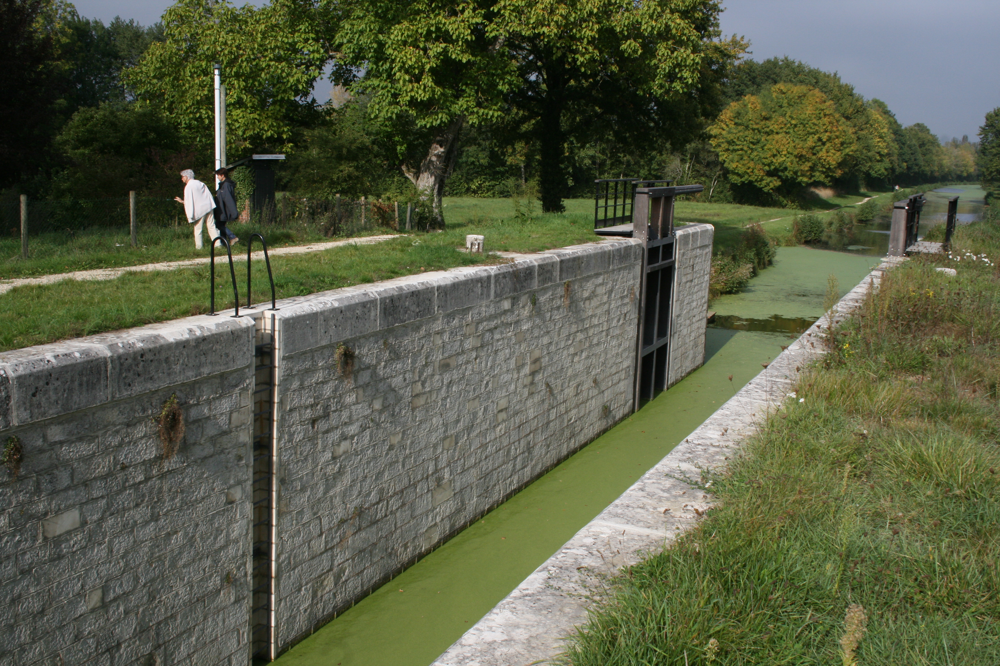 Canal d’Orléans. Ecluse du Hateau